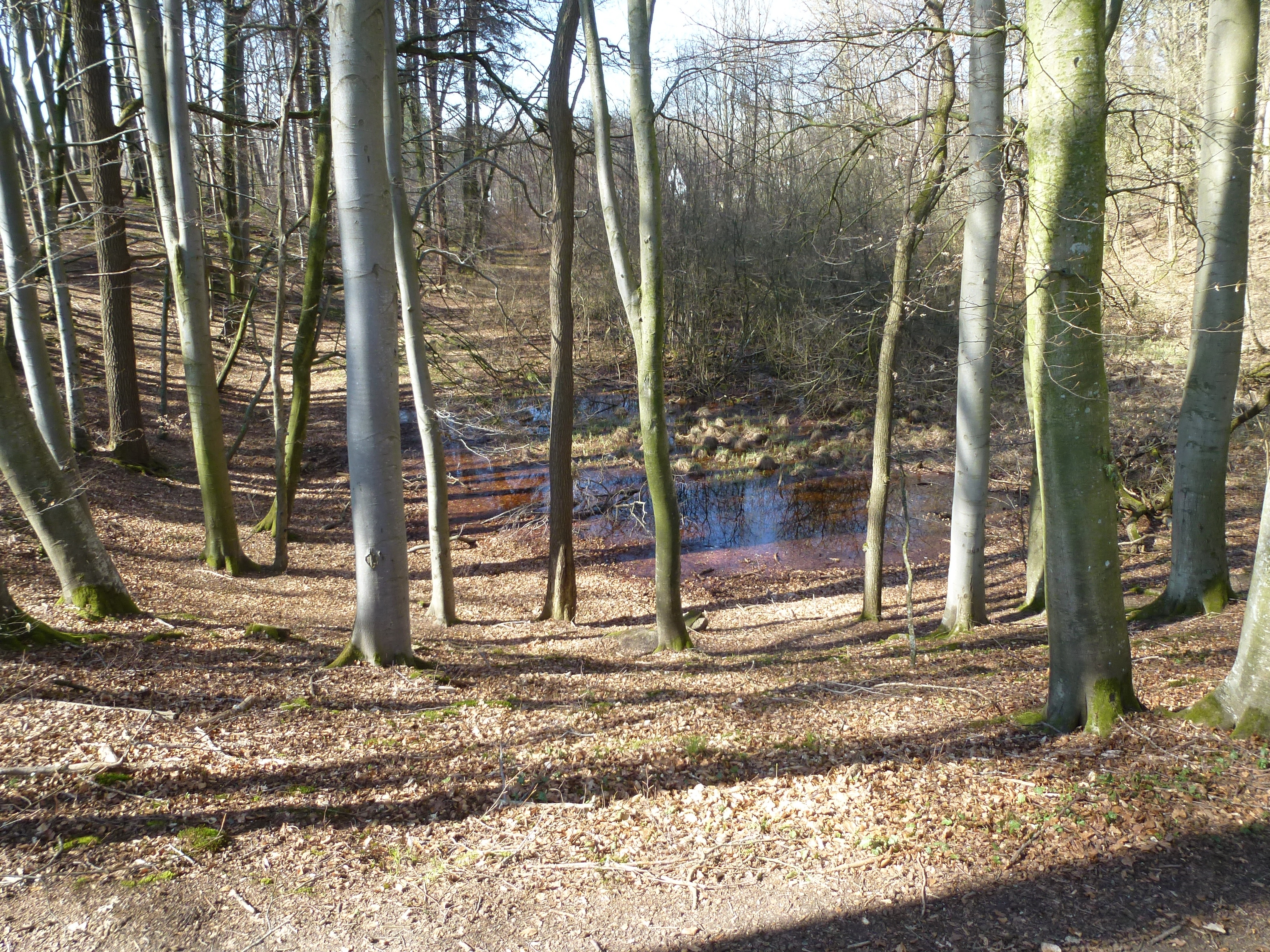 Grafrath-Wildenroth, Toteiskessel mit etwa 40x80m, besonders zwischen Südwesten und Südosten klar abgegrenzt zu den umgebenden Waldhängen. Ansicht von Nord-Osten